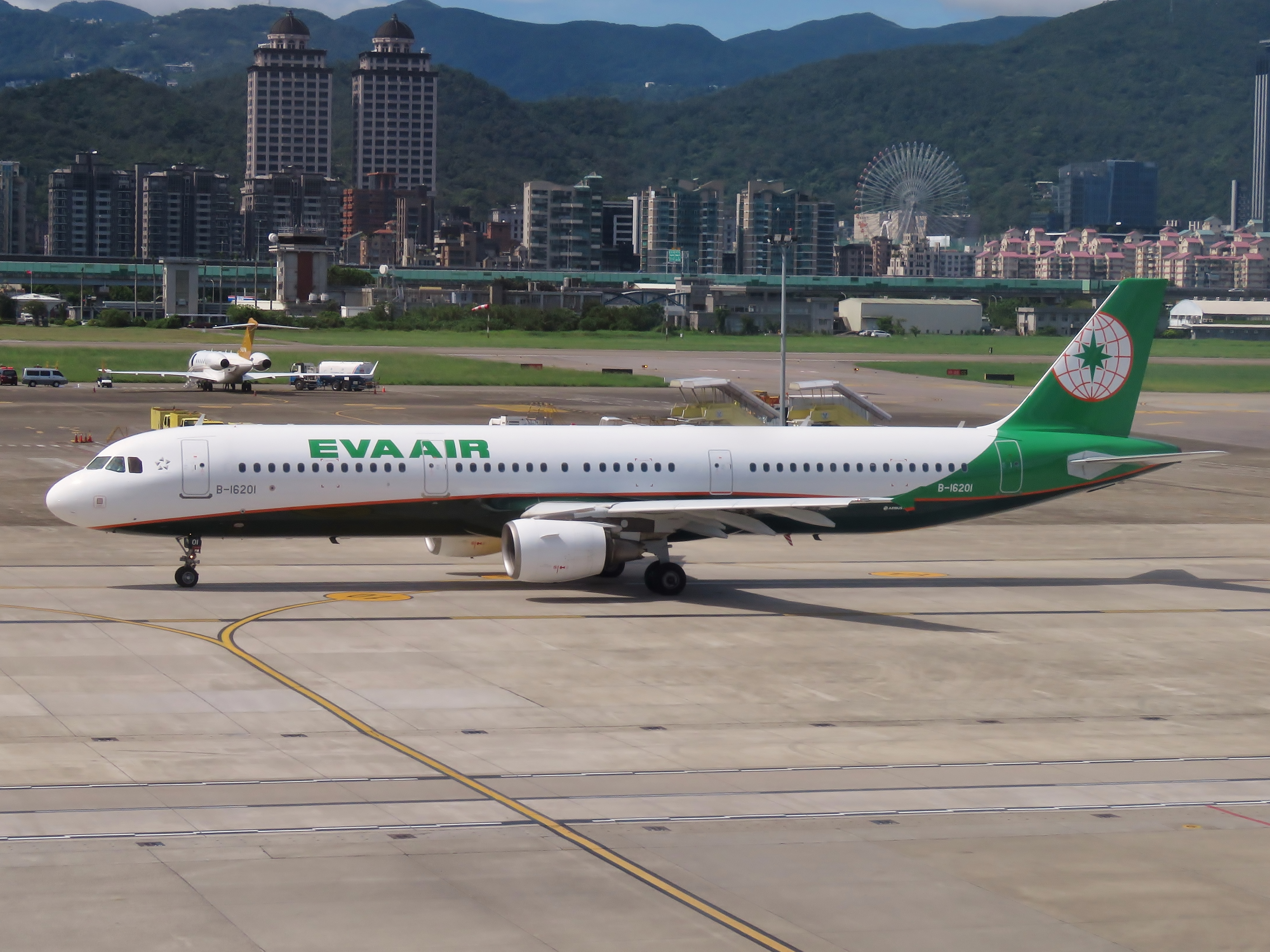 長榮航空 空中巴士A321-200 (航空器註冊編號:B-16201) 於台北松山機場